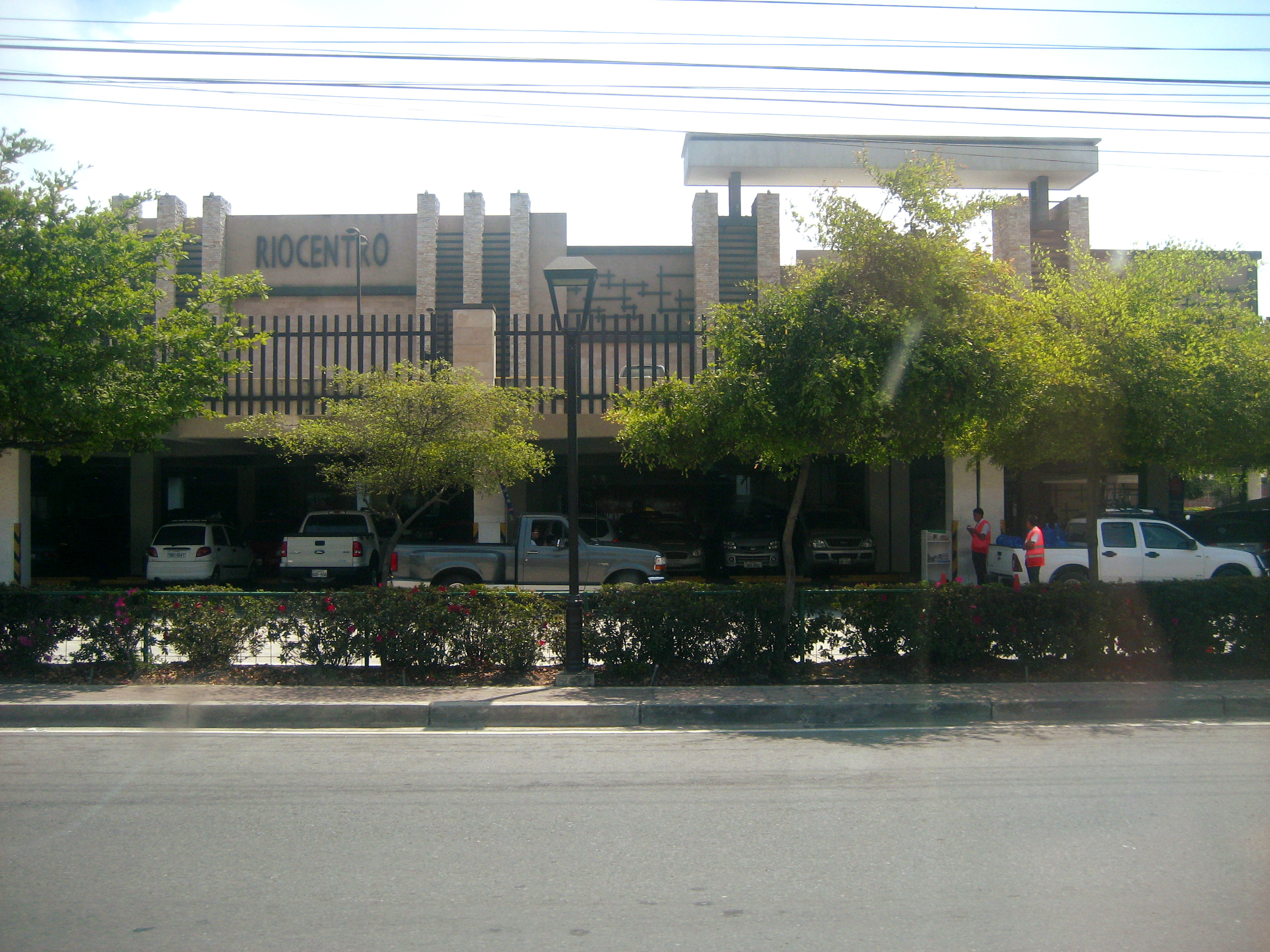 Foto del centro comercial Riocentro Entre Ríos